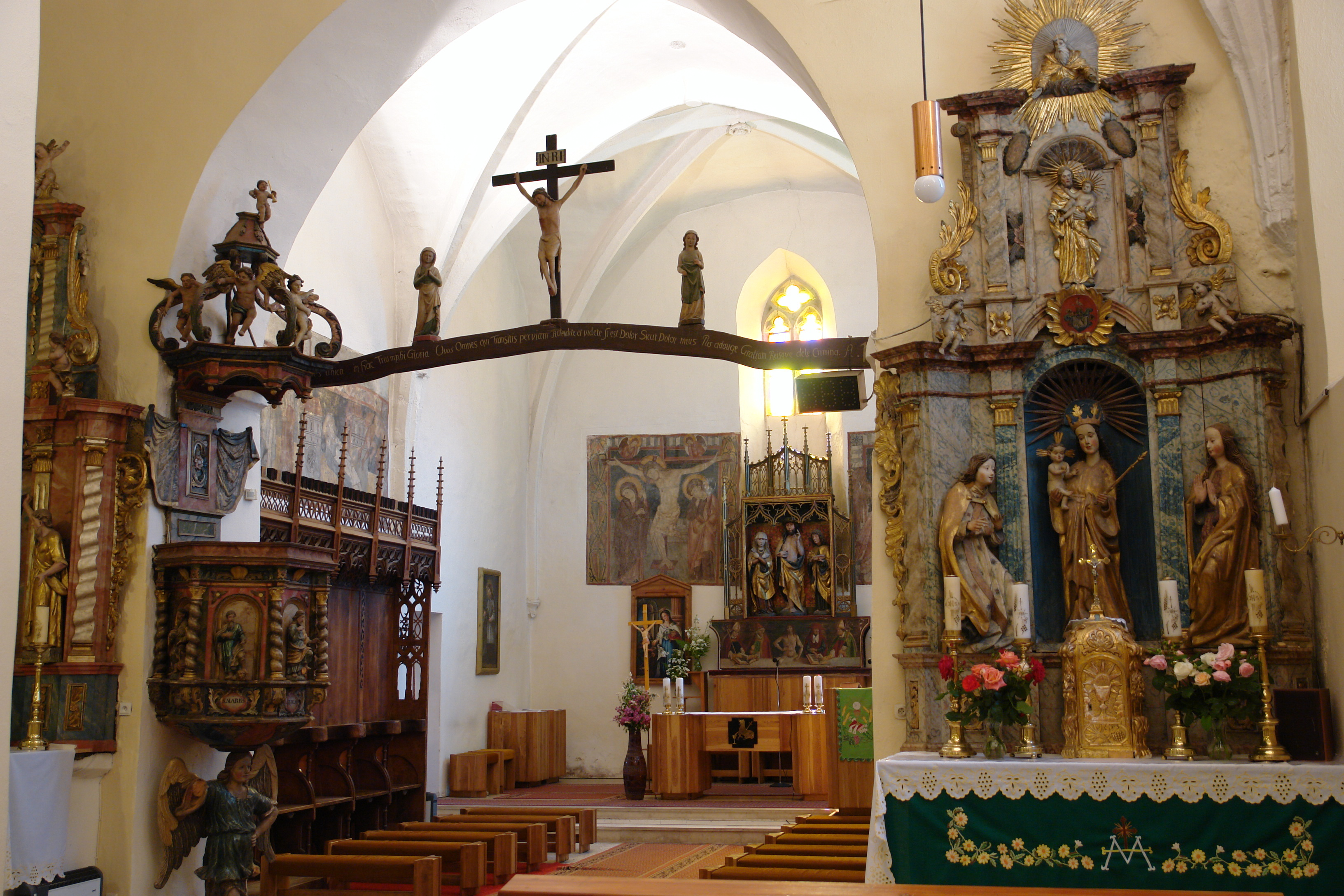 Szent Erzsébet, egykori antonita kolostor-templom Szepesdarócon